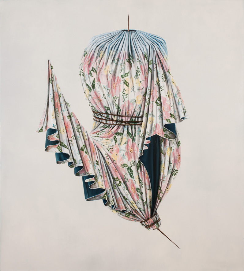 Mona Ardeleanu, Falter II, 2013